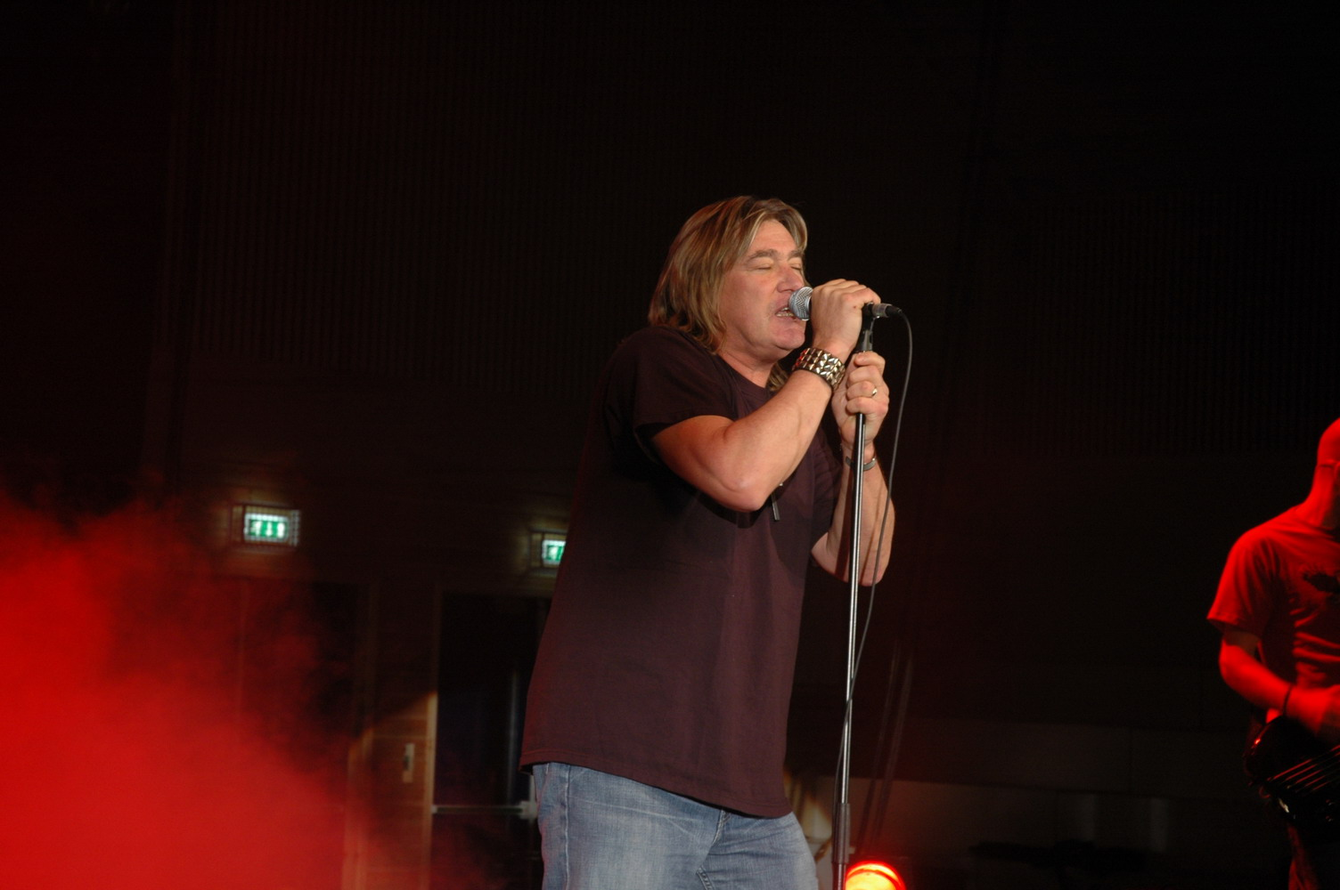 John Schlitt